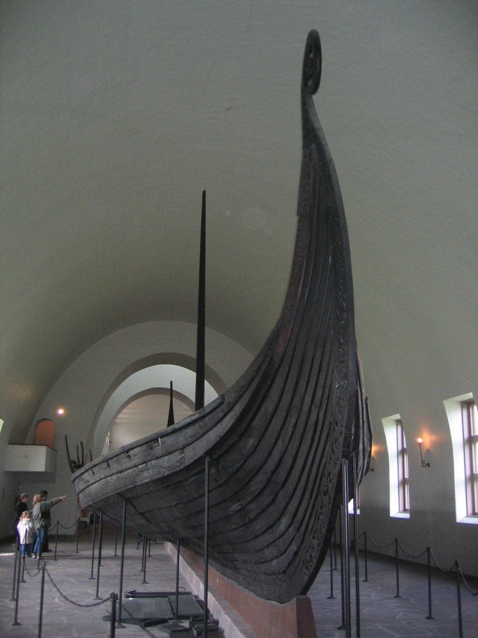 Osebergskipet, Vikingskipmuseet, Oslo